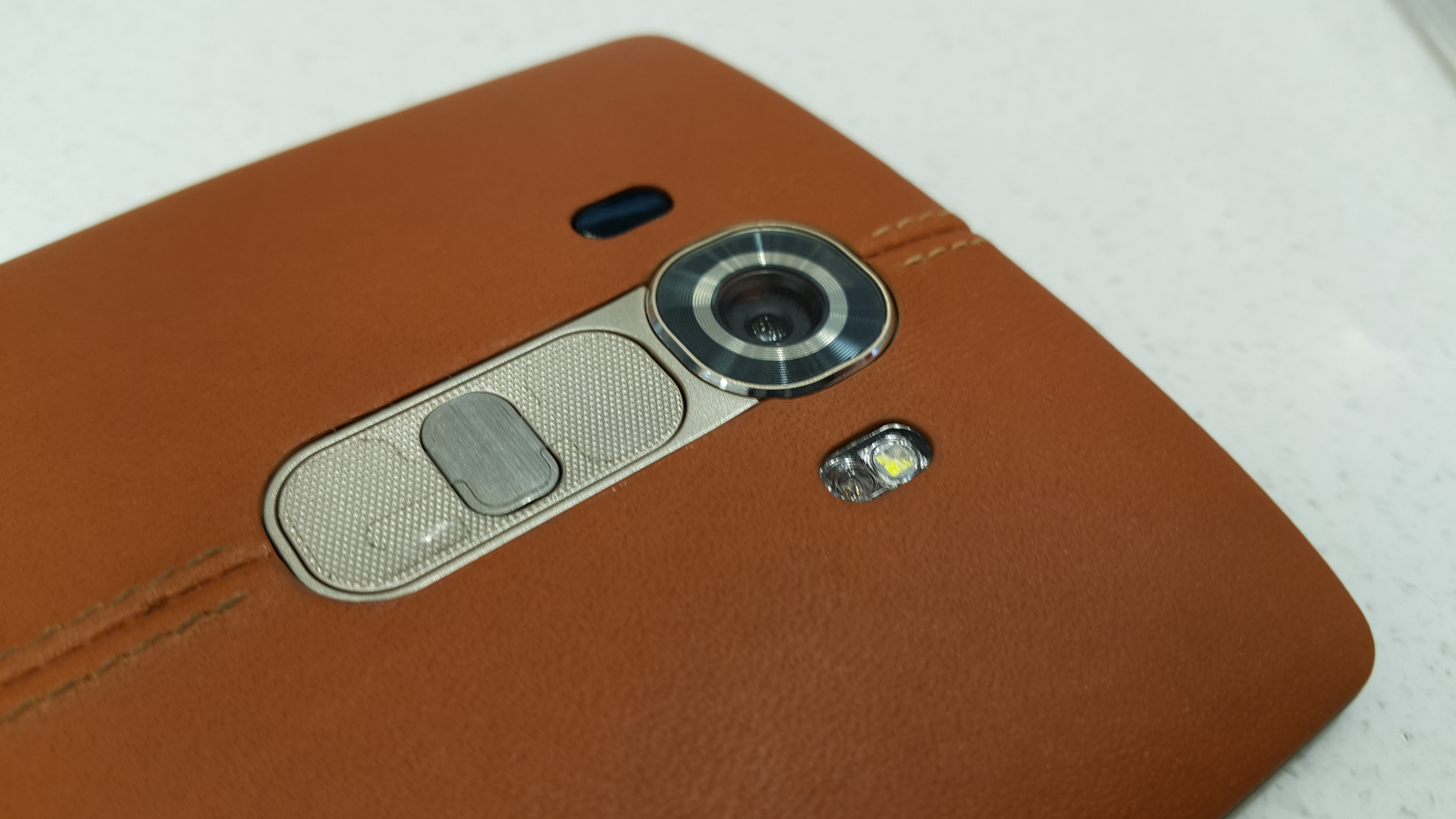 دوربین ال جی جی 4